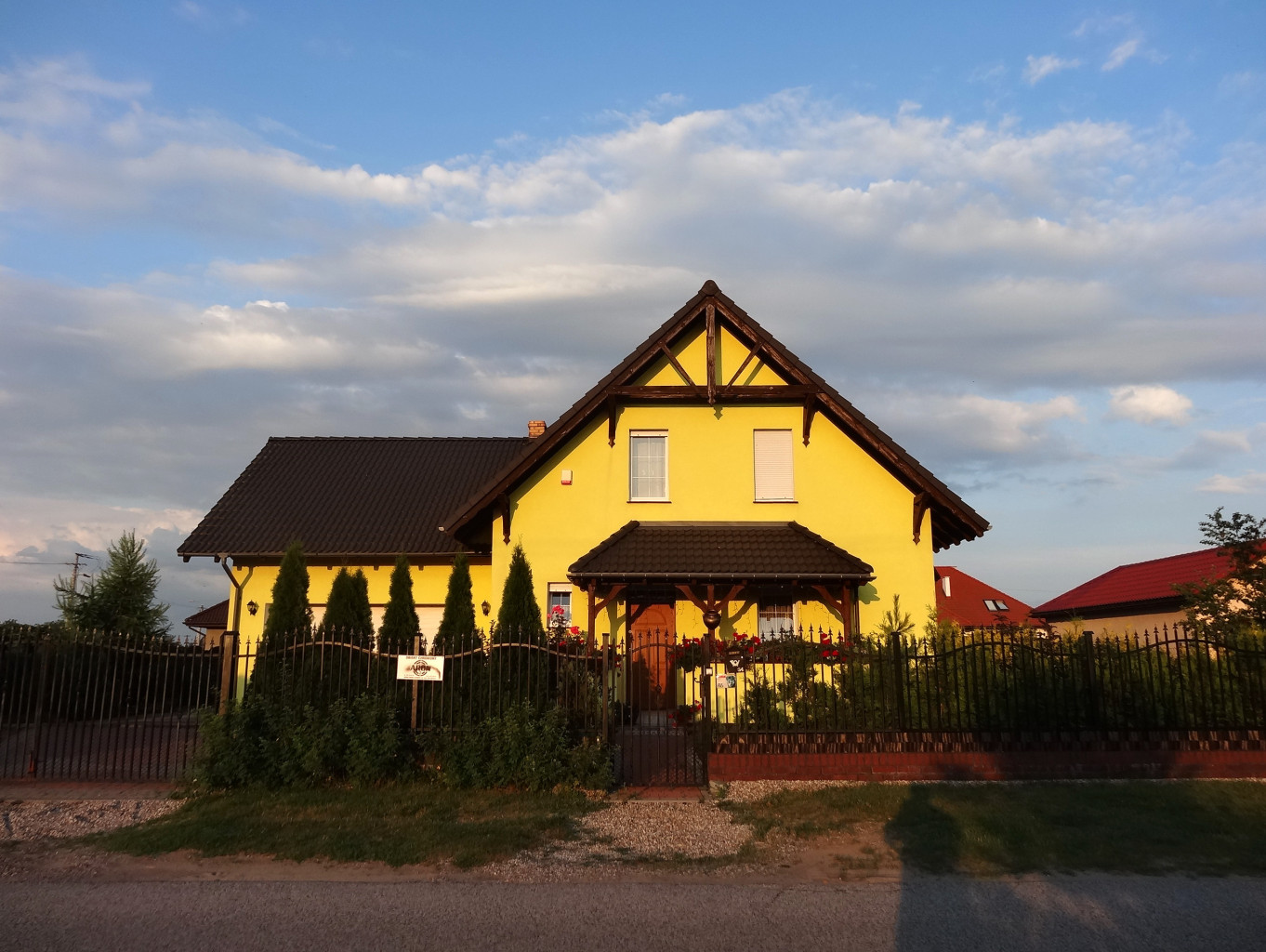 Łochowo, gmina Białe Błota, powiat bydgoski, województwo kujawsko-pomorskie